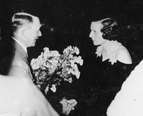 Adolf Hitler und Leni Riefenstahl 1934 Adolf Hitler begrüßt Leni Riefenstahl. Zentralbild Abgebildete Personen: Hitler, Adolf: Reichskanzler, Deutschland Riefenstahl, Leni: Filmproduzentin, Regisseurin, Schauspielerin, Fliegerin, Bundesrepublik Deutschland (GND 118600761)